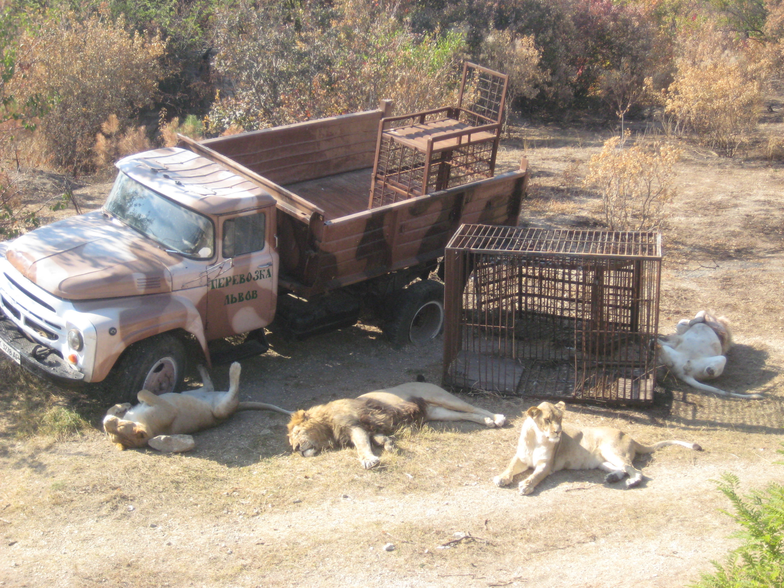 Сафари-парк «Тайган»: ул. Лавандова, 1, г. Белогорск, Белогорский район, Крым This object is located on the Crimean Peninsula and recognized as a protected area by both Russia and Ukraine under the ID: 8210074 / 01-207-5012, respectively. The legal status of the Crimean region is currently disputed.